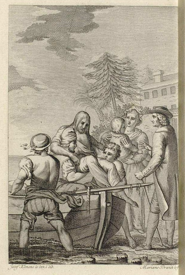 Eusebio. Grabado de Mariano Brandi por dibujo de José Ximeno, ilustración para la edición de Antonio Sancha de la obra de Pedro Montengón